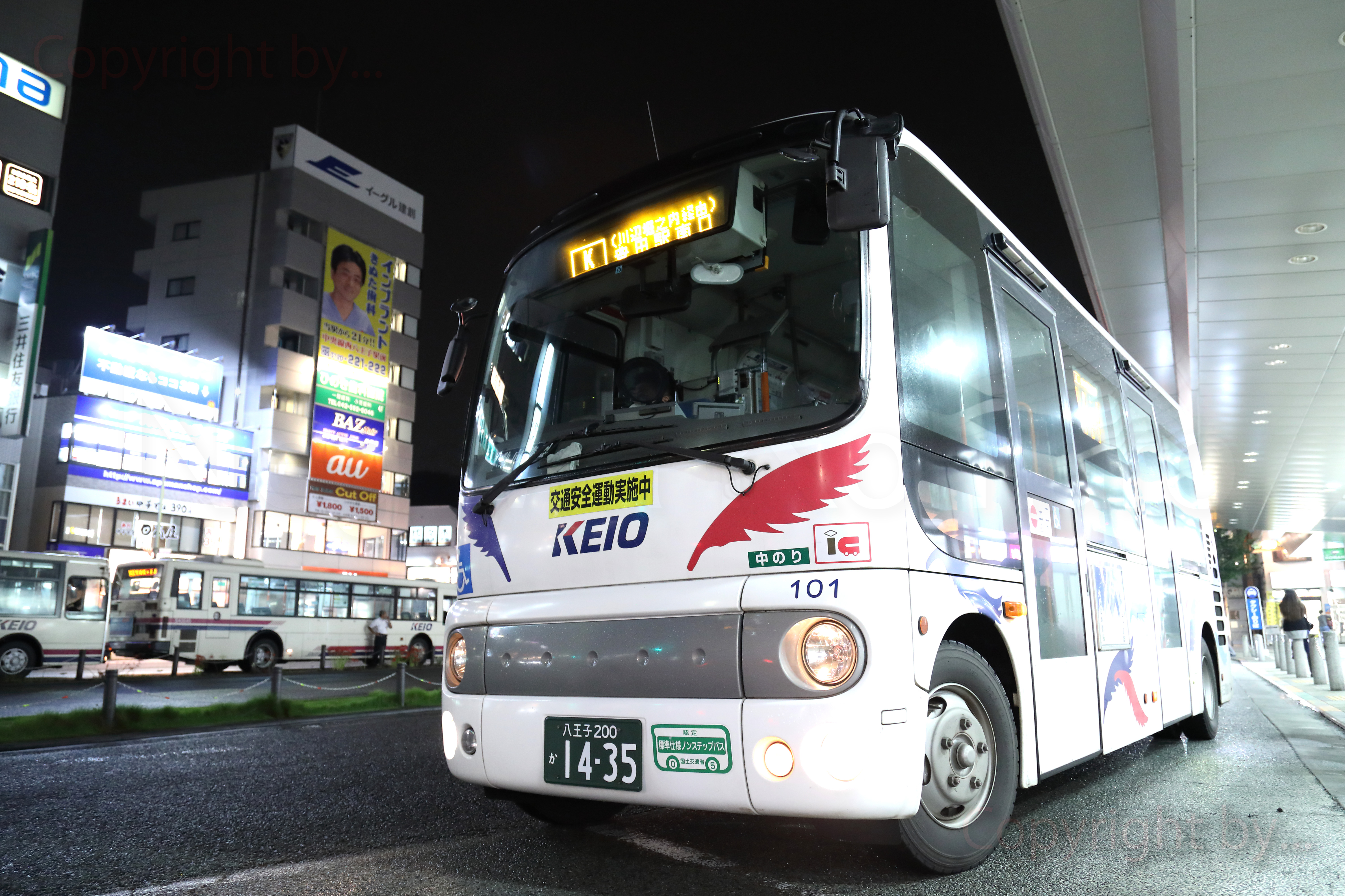 2代目日野 ポンチョの日野市ミニバス仕様（川辺堀之内路線）